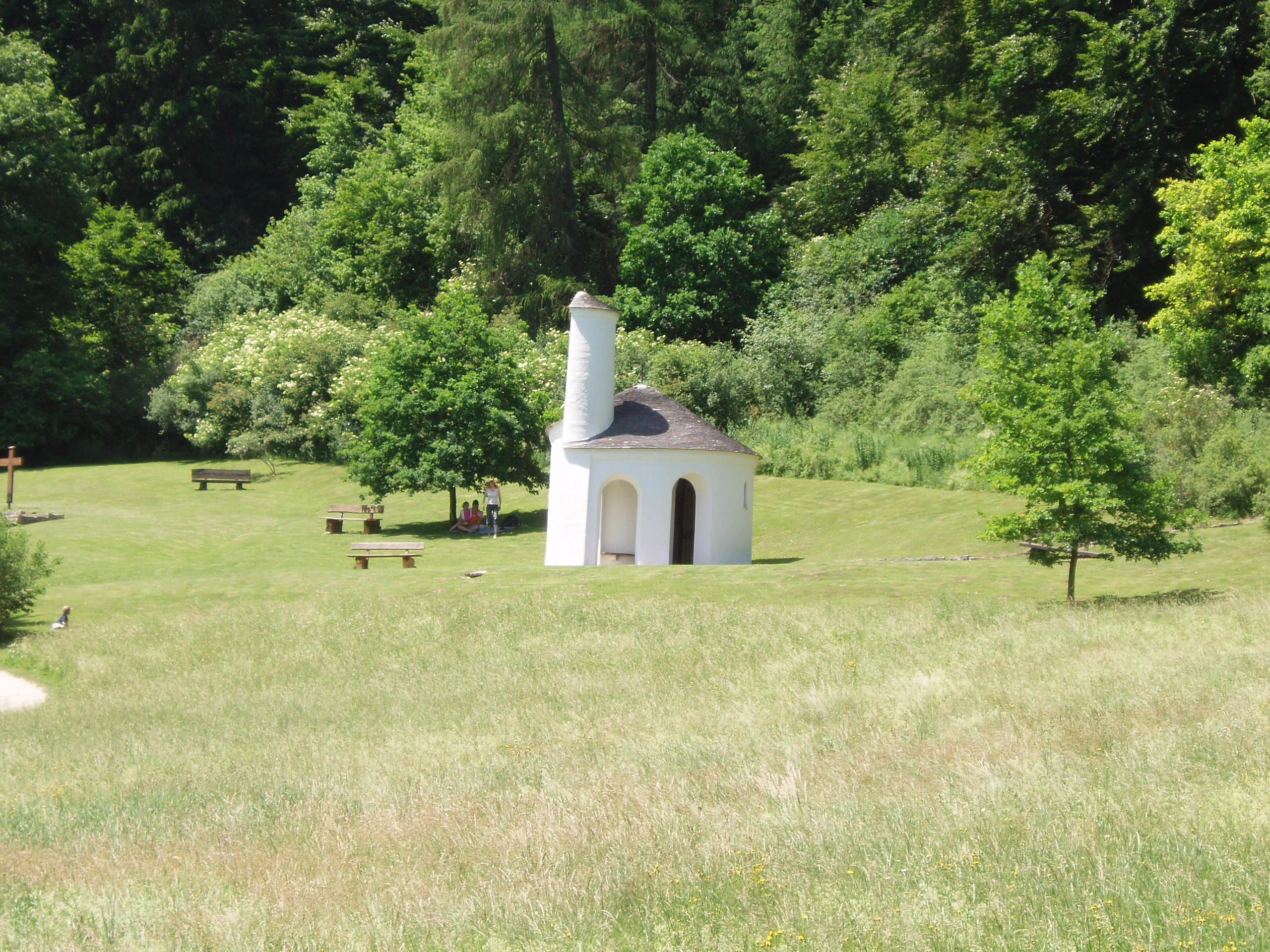 Gunthildis-Kapelle "Schneckenhaus Gottes" im Schambachtal bei Suffersheim, Bayern